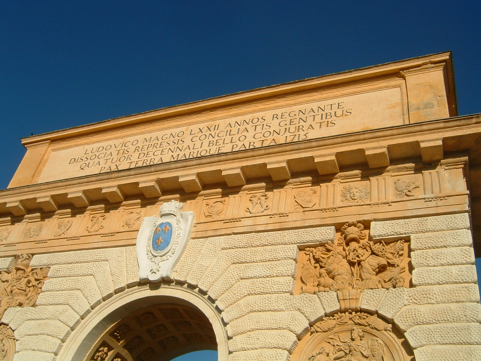 Foto: Adrian Schneider, 2005